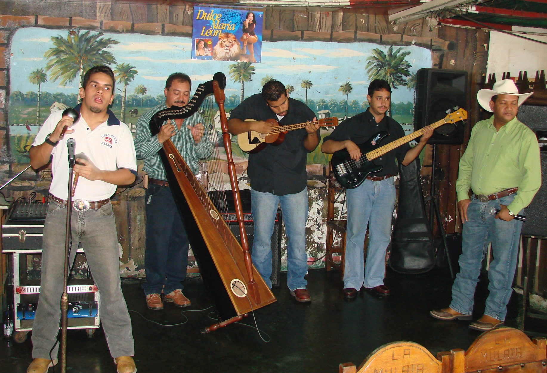 La Mulata. Entre Villa de Cura y San Juan de los Morros. Musica de Venezuela, Musica de Colombia